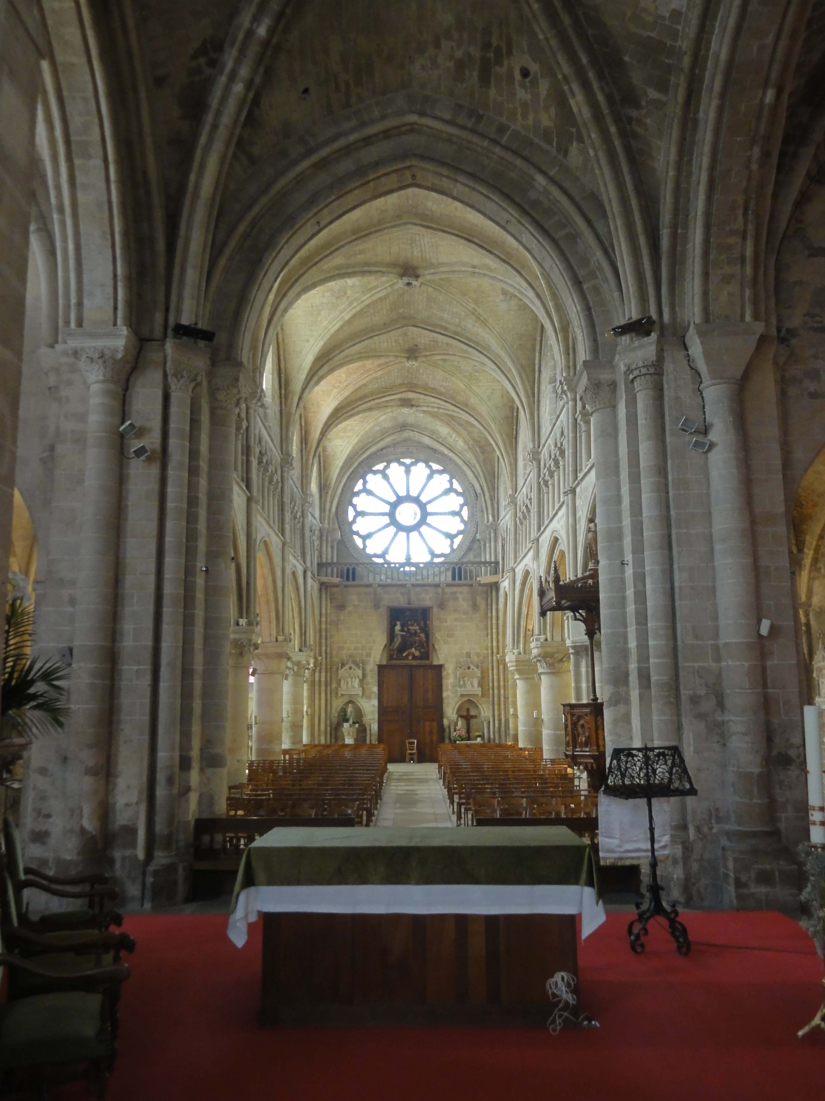 Intérieur de l'église - voir titre.